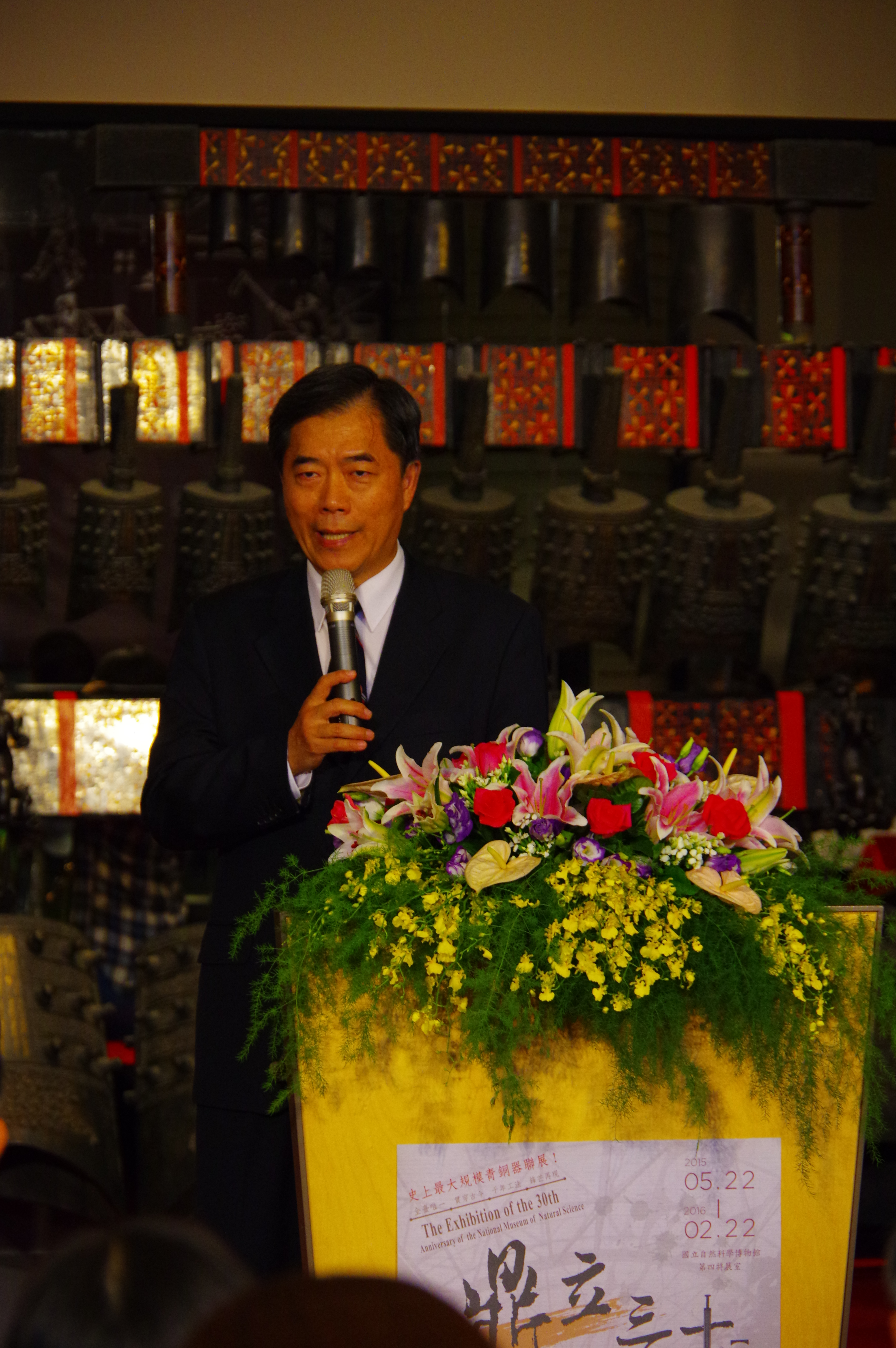 臺灣天文學家孫維新。